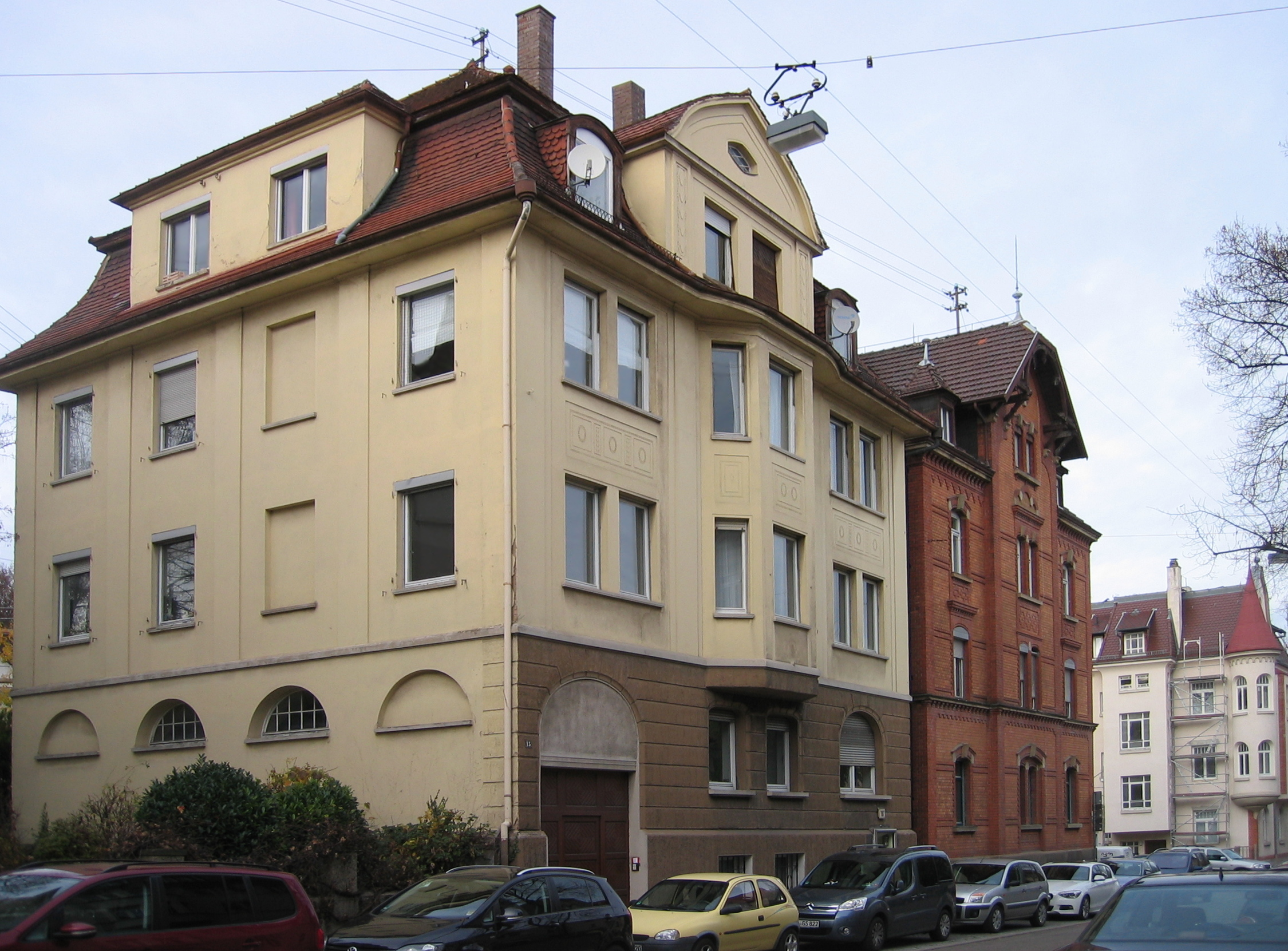 Abelstraße 17 Ludwigsburg